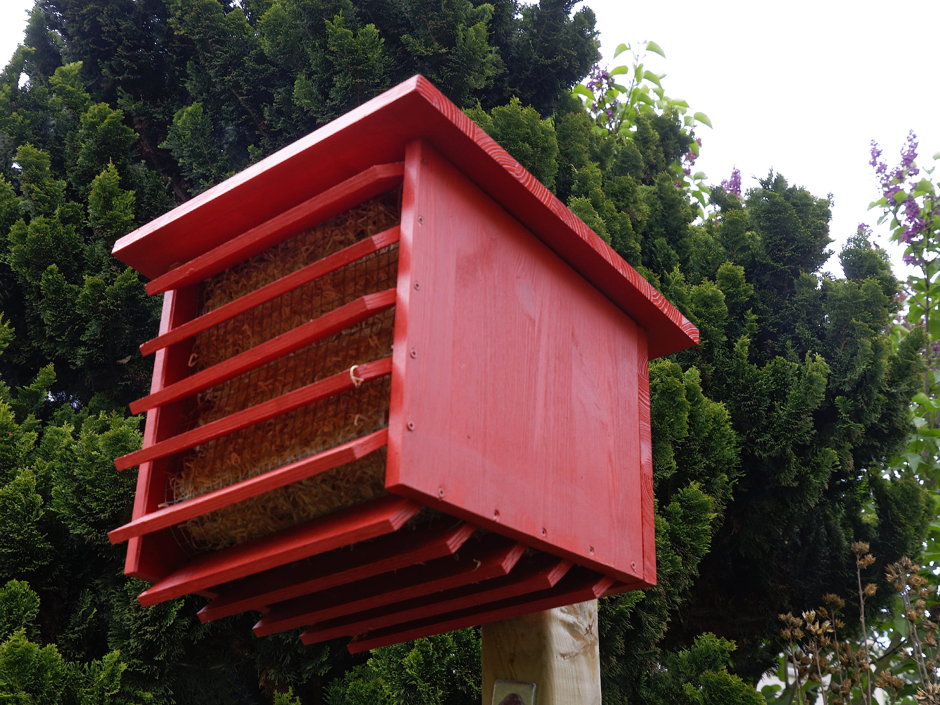 Florfliegenkasten